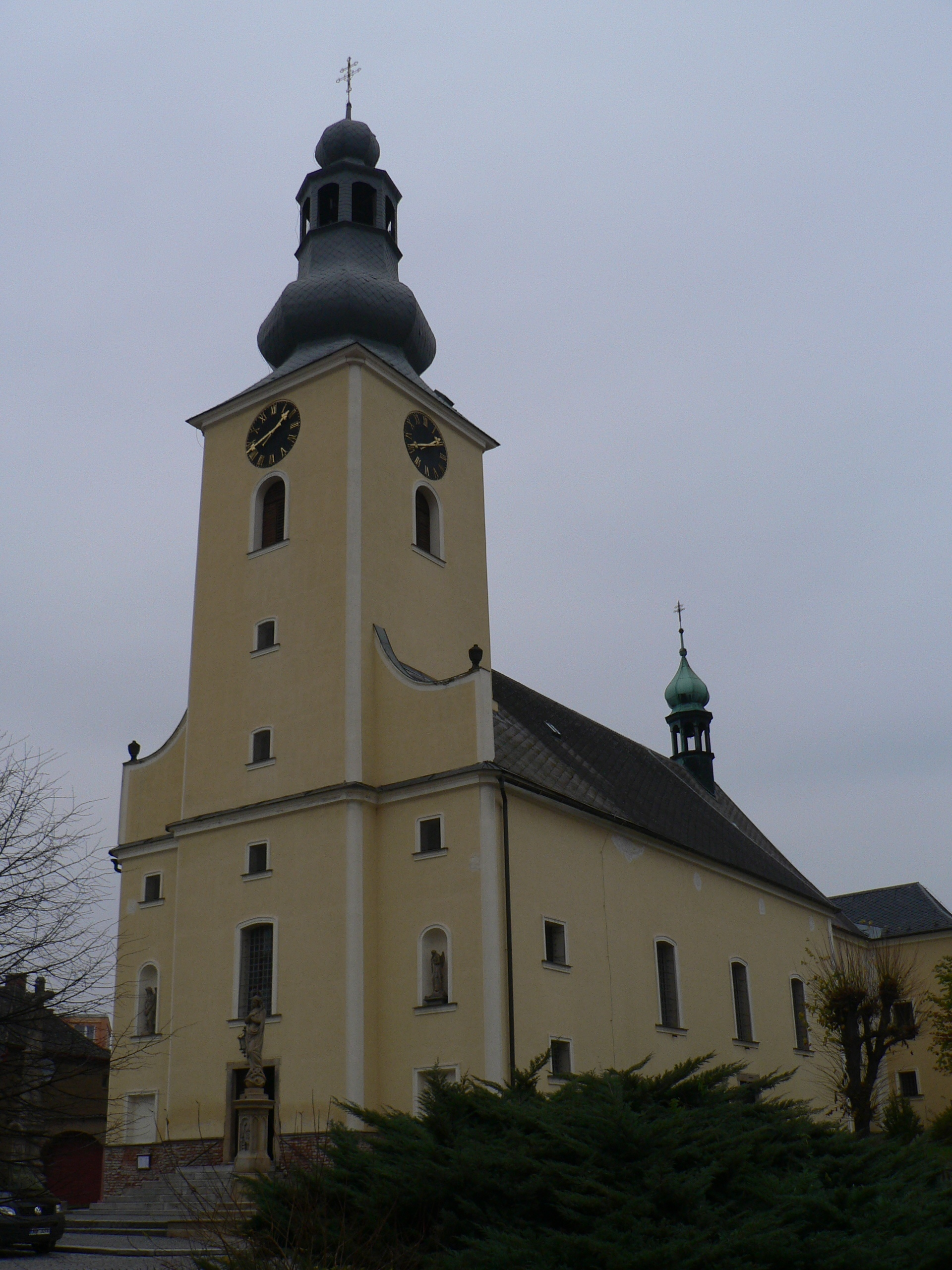 Kostel svatého Prokopa (Loštice)